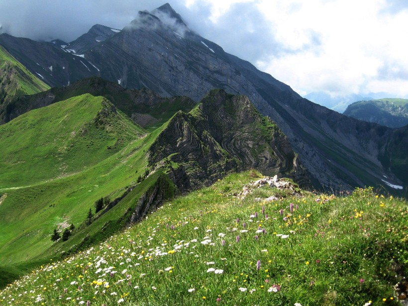 Schwalmis von Osten aus Richtung Oberbauenstock